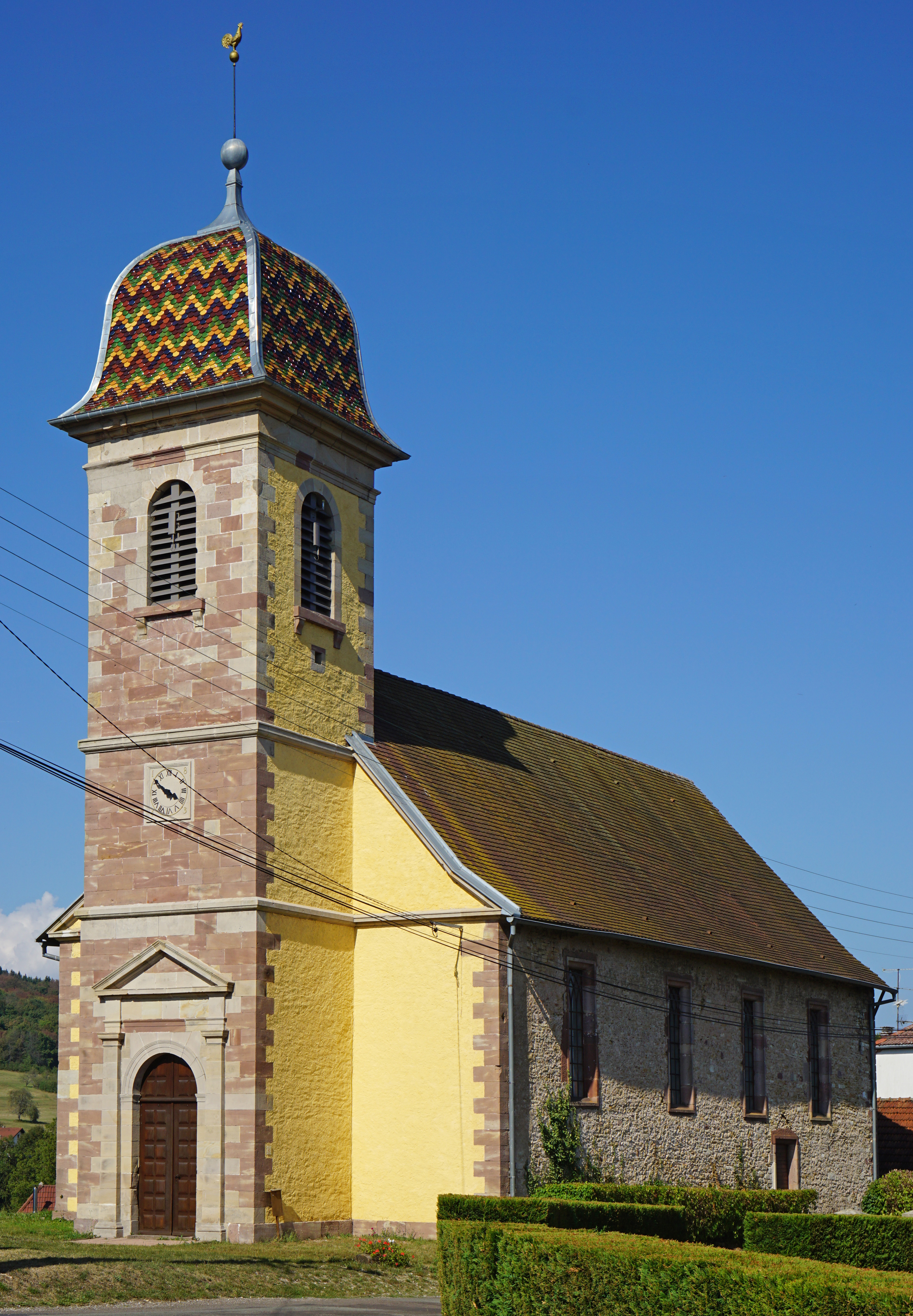 Le temple protestant de Trémoins.